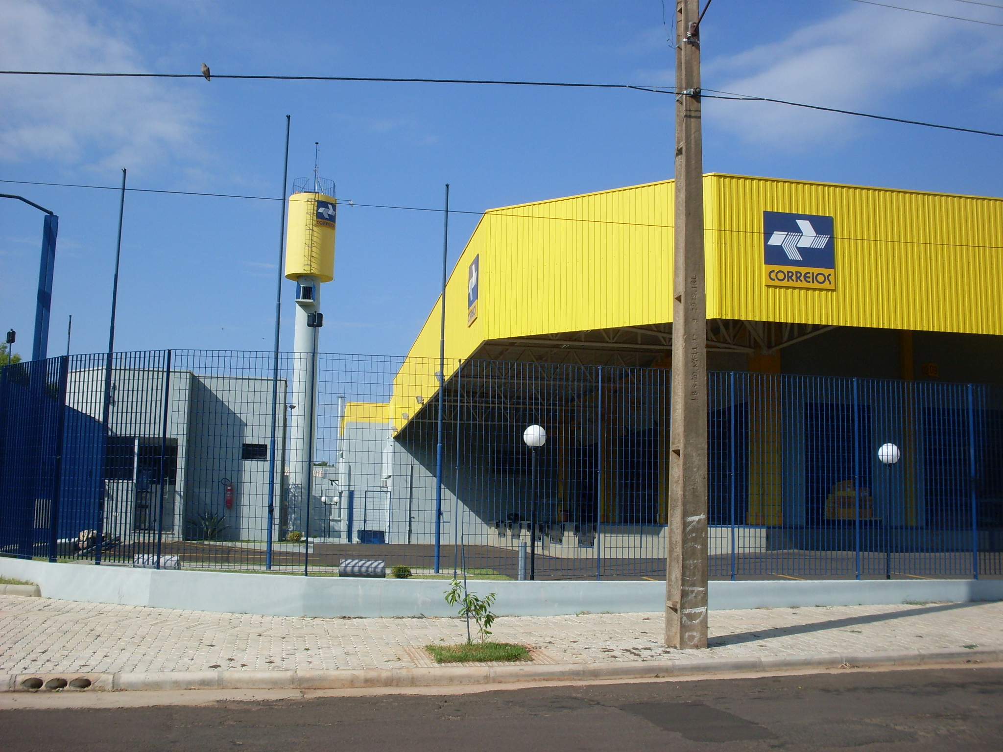 Agência dos Correios localizada no Jardim Alto da Boa Vista (Presidente Prudente).